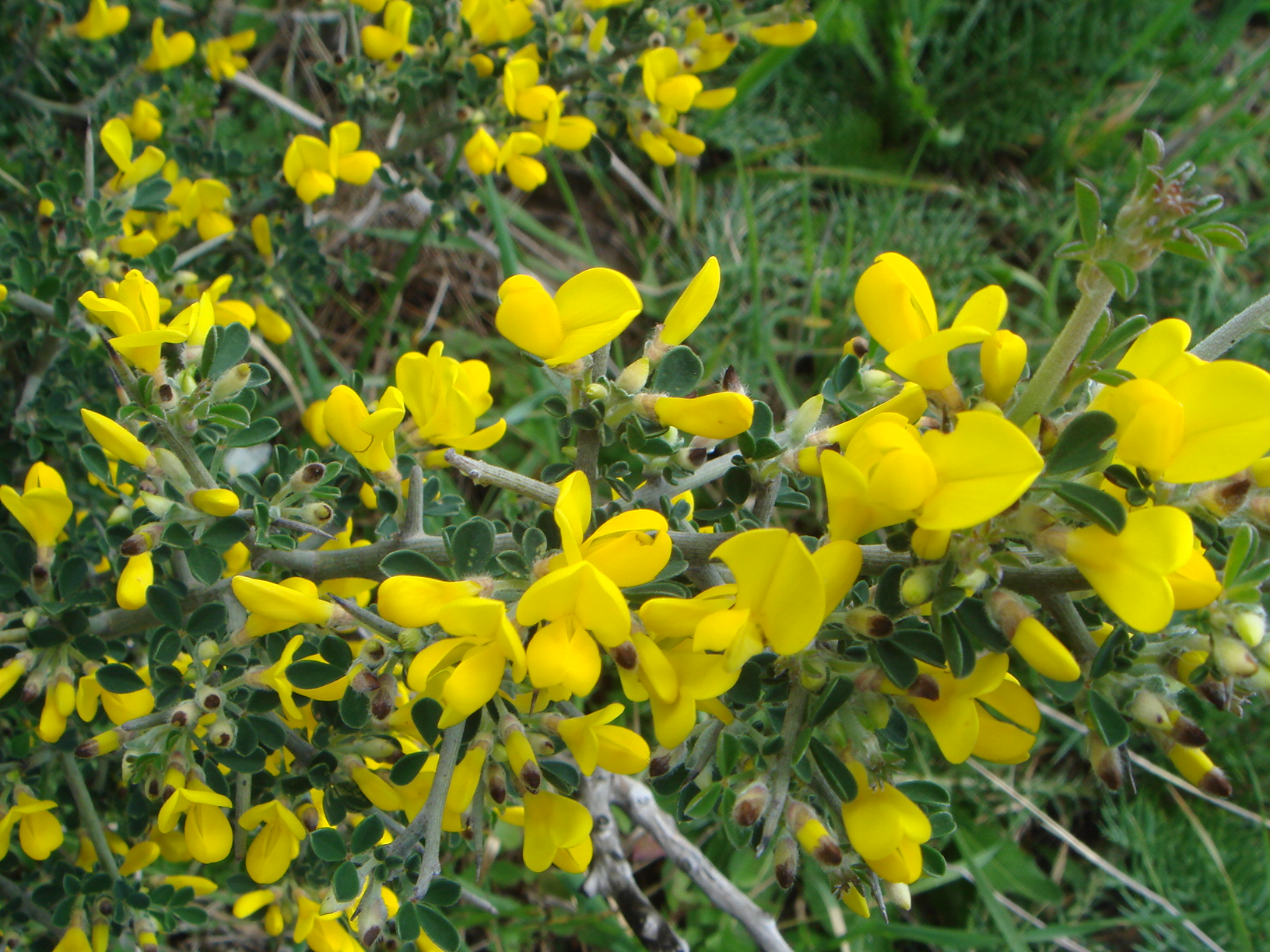 Calicotome villosa, costa de Algeciras, Cádiz, España